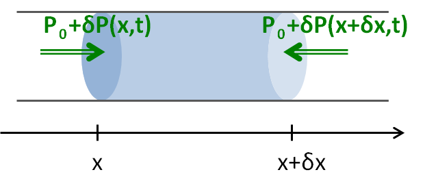 気柱にかかる圧力を示す。